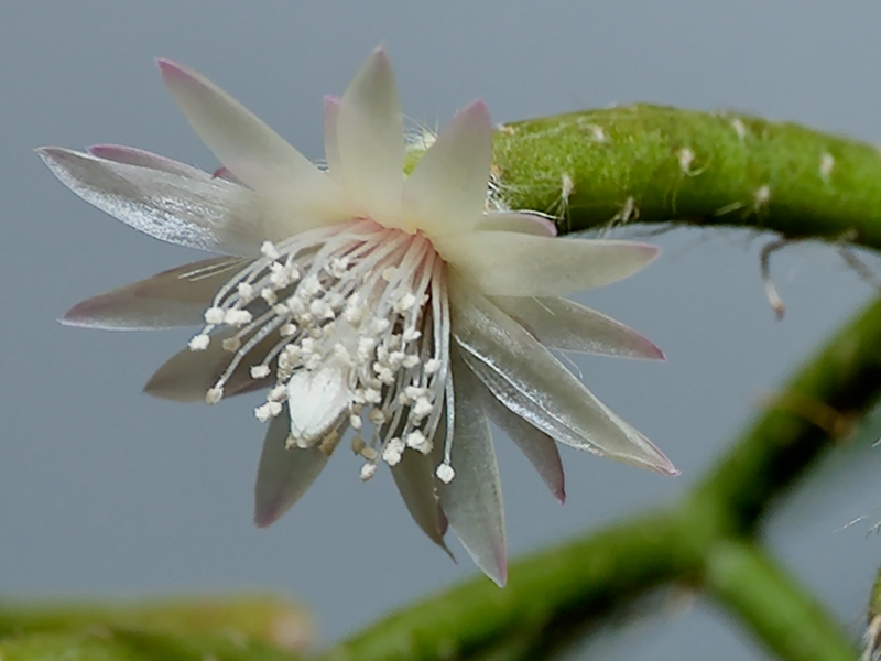 Rhipsalis pilocarpa